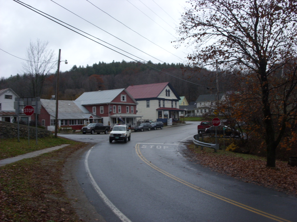 Street in Jacksonville, Vermont